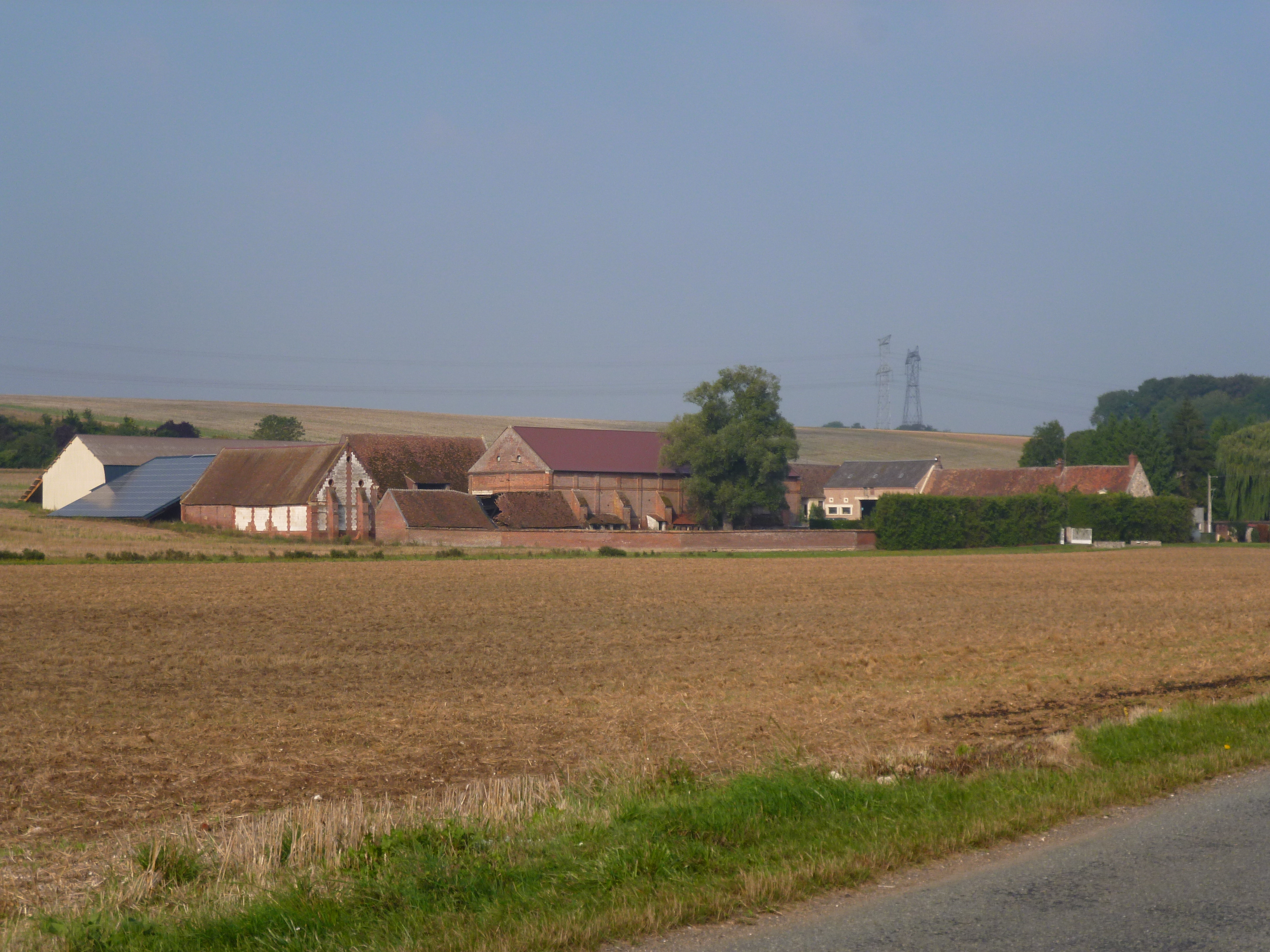 Grange de Mauregard, située sur la commune de Reuil-sur-Brêche (Oise, Picardie). Inscrite MH 1988. .